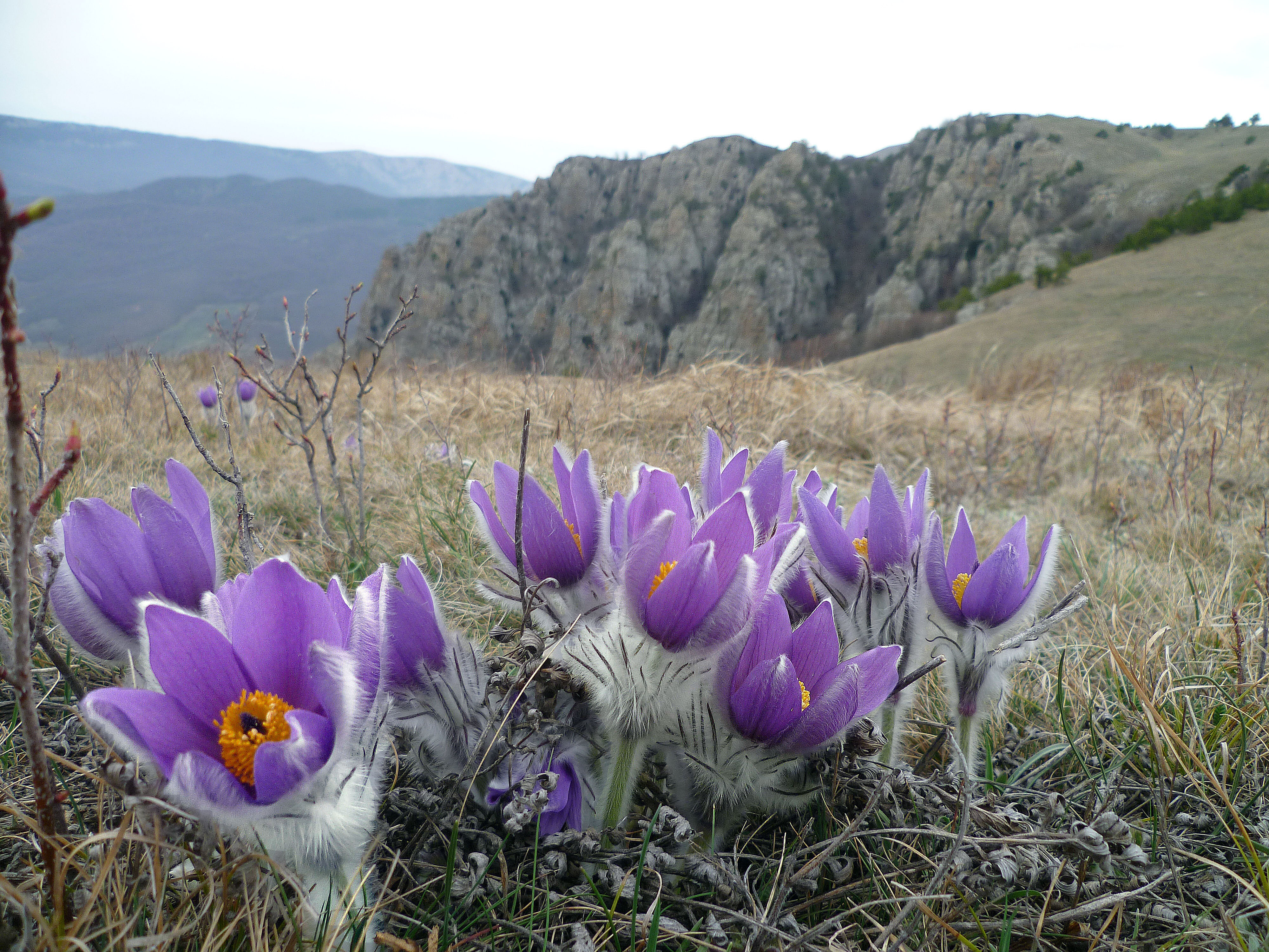 Сон-трава на южной г. Дeмерджи